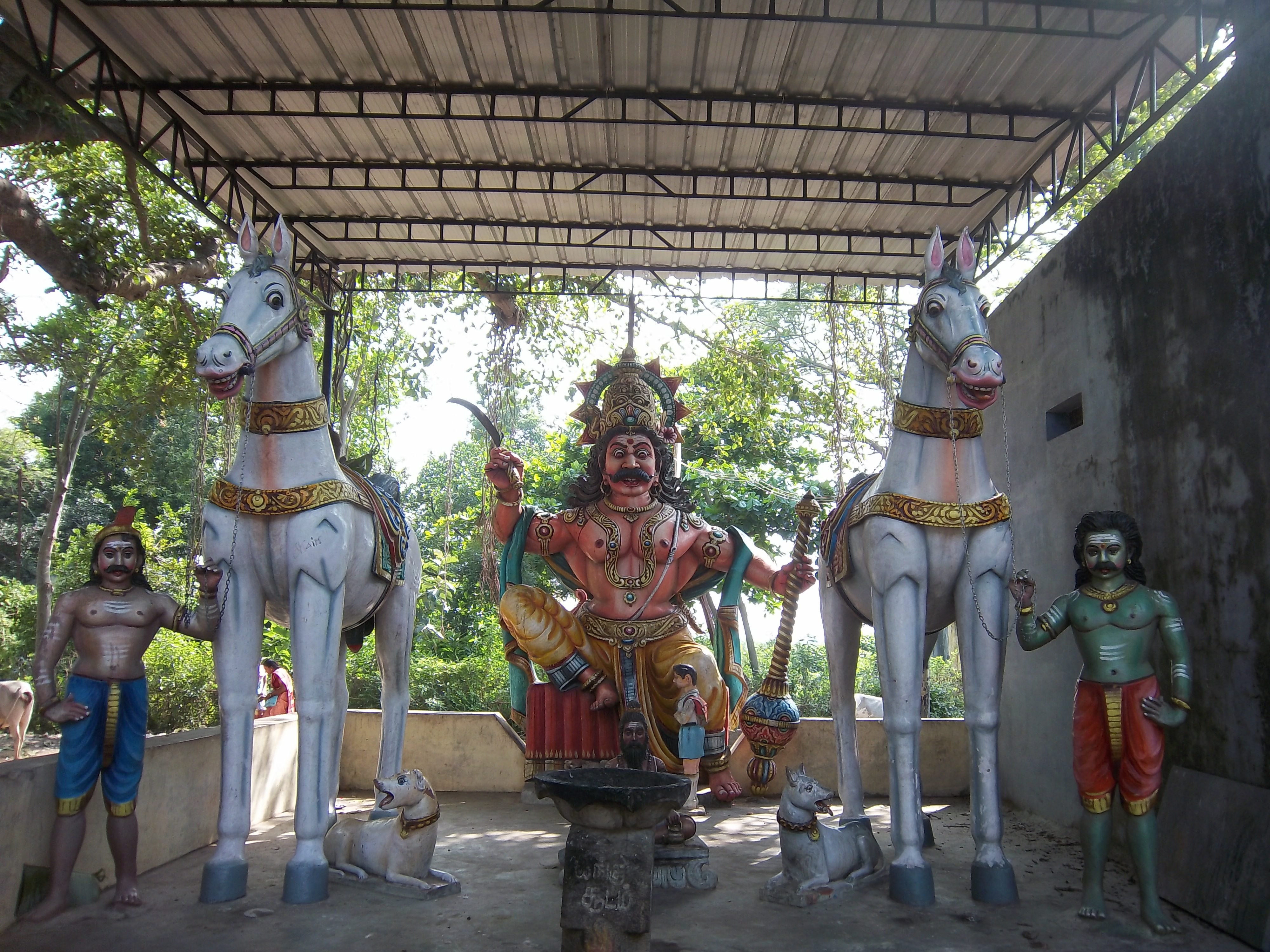 கொளஞ்சியப்பர் கோயிலின் உடபுறம் அமைந்துள்ள காவல் தெய்வம்